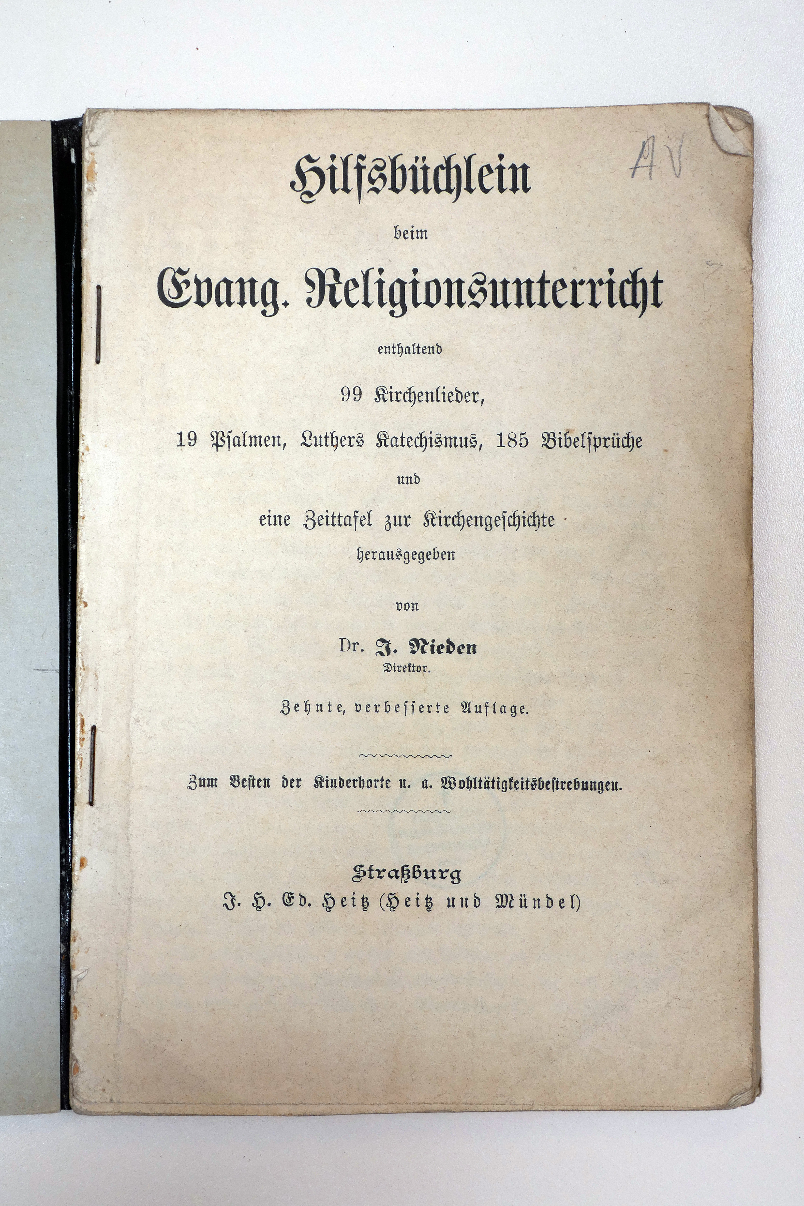 Hilfsbüchlein beim Evang. Religionsunterricht : enthaltend 99 Kirchenlieder, 19 Psalmen, Luthers Katechismus, 185 Bibelsprüche und ein Zeittafel zur Kirchengeschichte ; herausgegeben von J. Rieden Strasbourg : J. H. Ed. Heitz (Heitz & Mündel), s.d., Zehnte, verbesserte Auflage, 92 p. ; 19,5 cm Médiathèque protestante de Strasbourg. Cote : A Va 0343